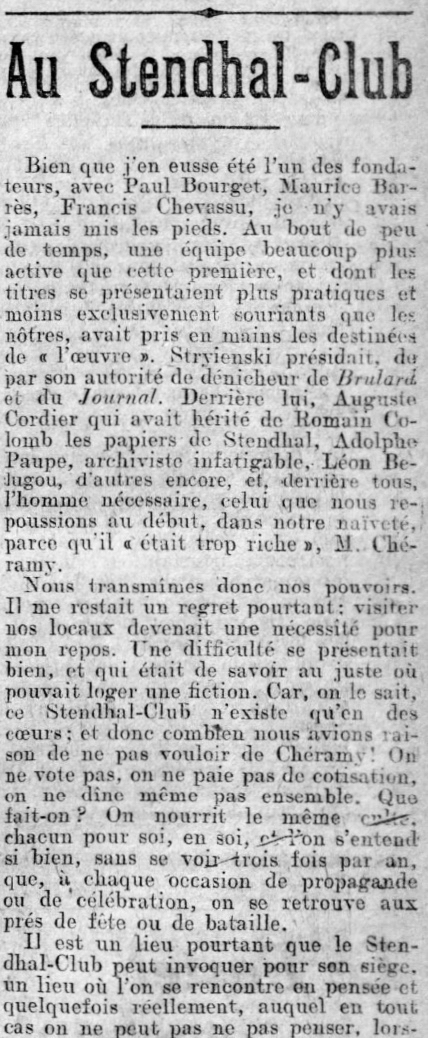 L'Homme libre, journal quotidien de Clemenceau, "Au Stendhal-Club", article d'André Maurel, 12 mars 1914